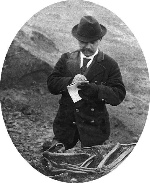 Josef Antonín Jíra (1868 – 1930), Český archeolog a sběratel.